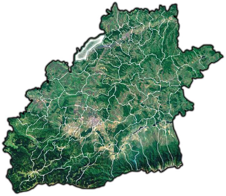 Micasasa jud Sibiu